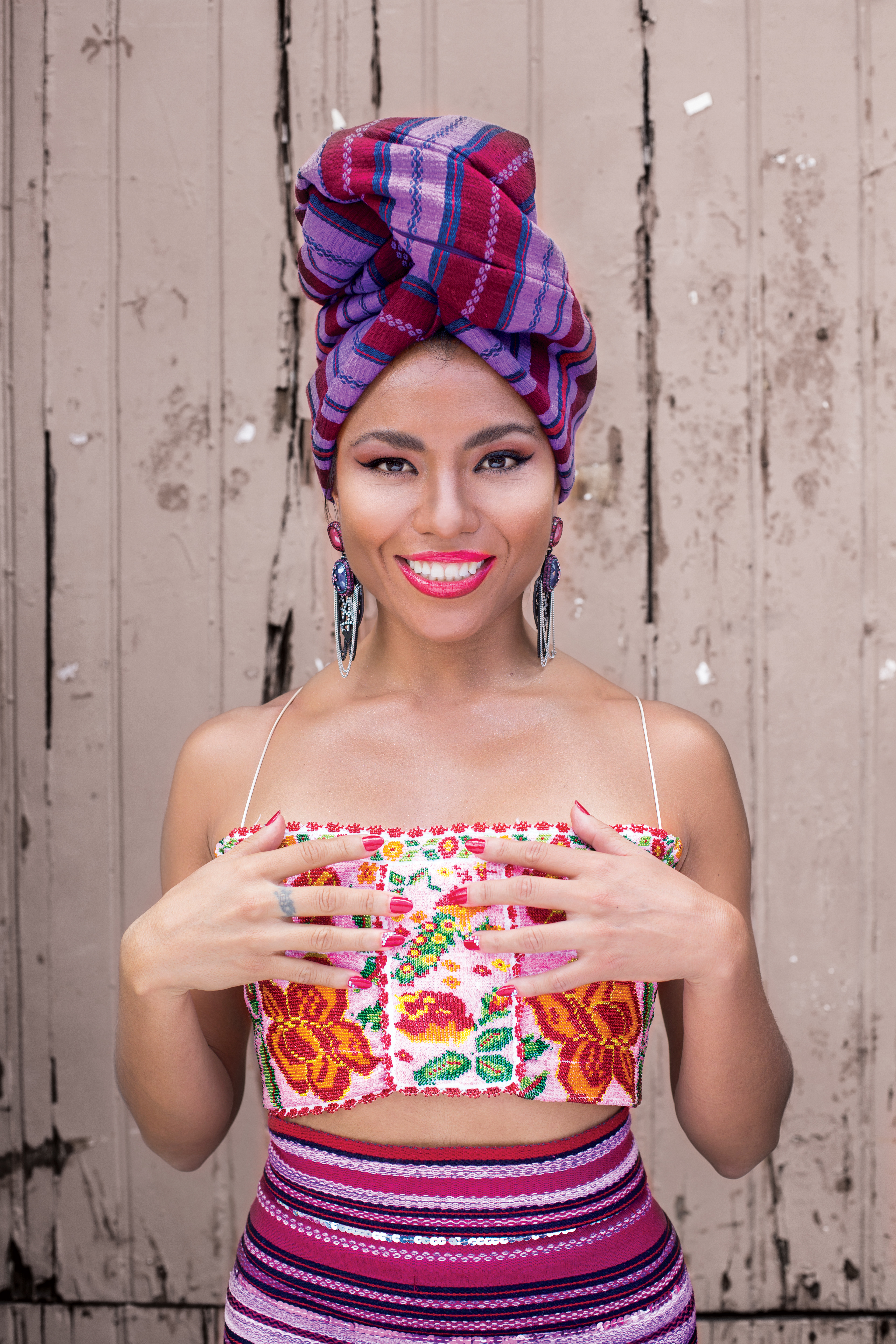 Sesión Fotográfica para la revista Socialmente de Oaxaca